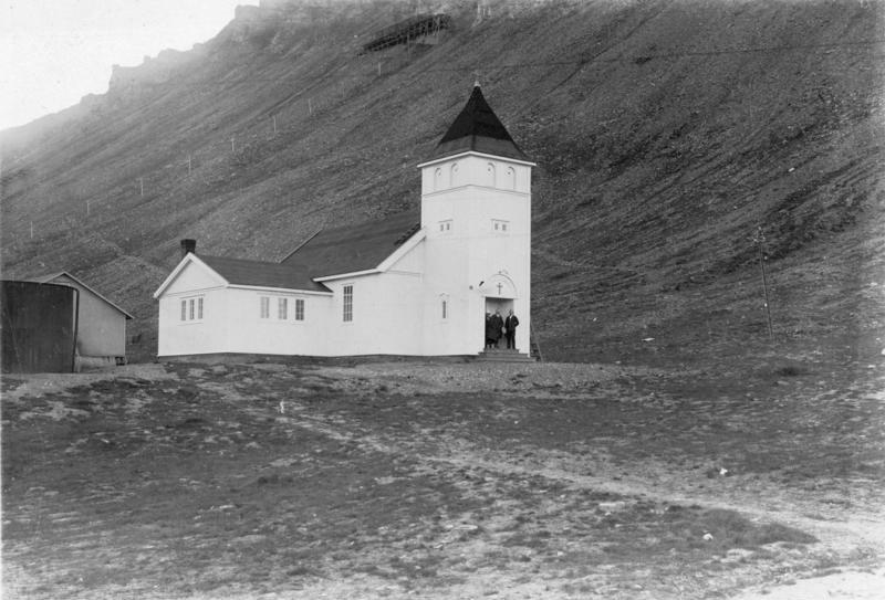 Polarfahrt mit dem Dampfer "München".- Die Kirche von Advent-Bay 17. Juli - 12. August 1925